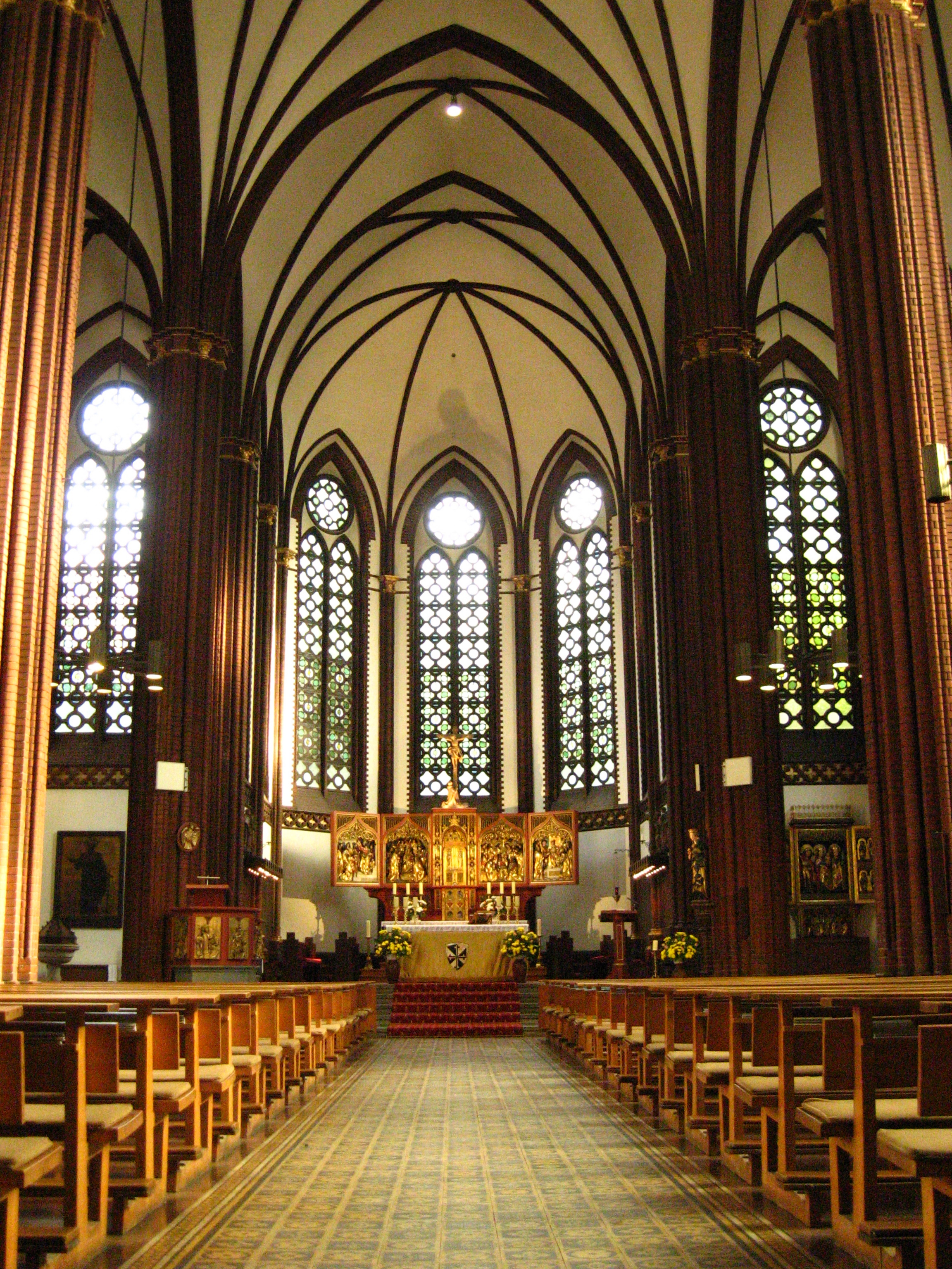 Berlin-Moabit - St. Paulus - Innenraum